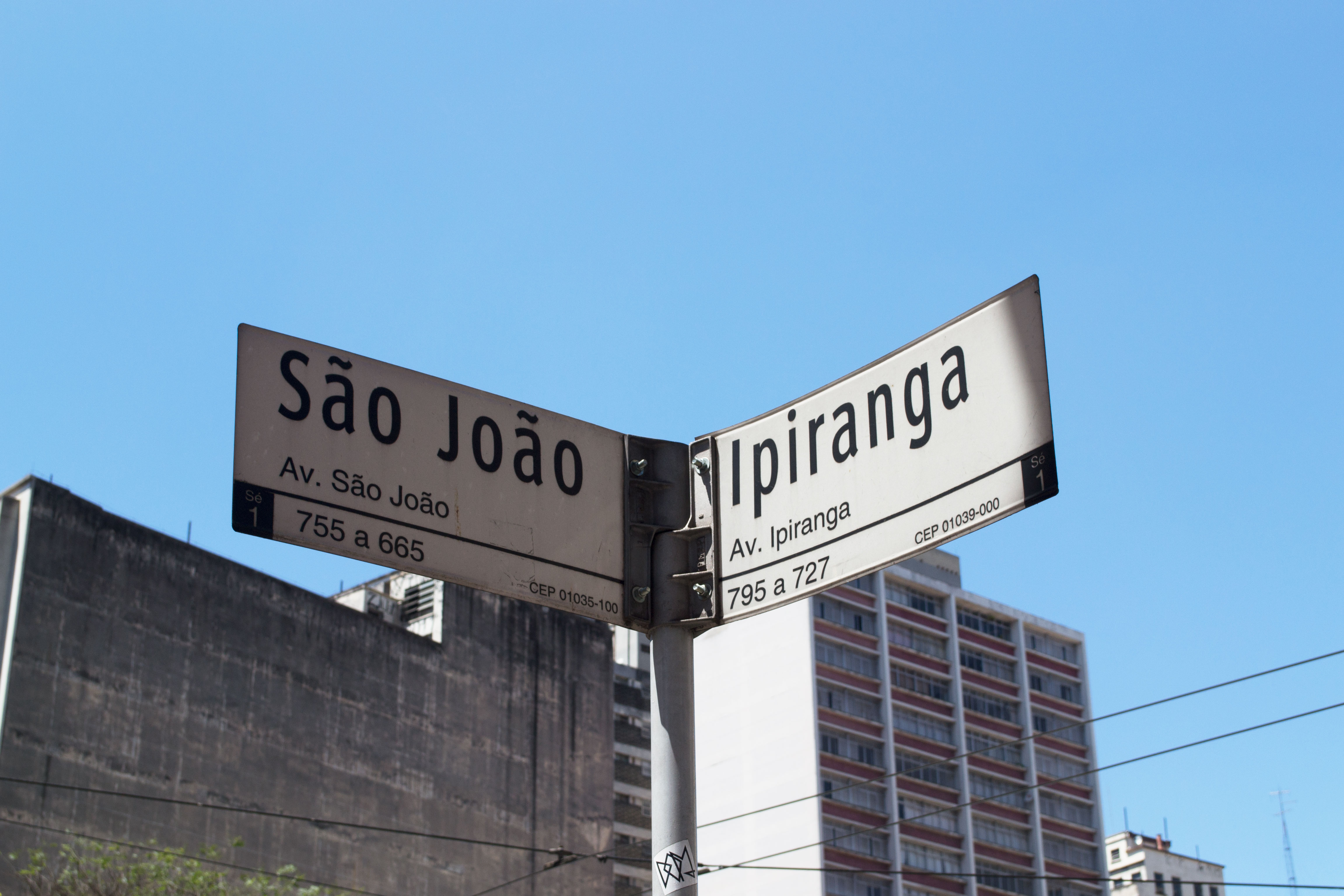 Esquina mais próxima do Hotel Excelsior Ipiranga, São Paulo (SP), Brasil